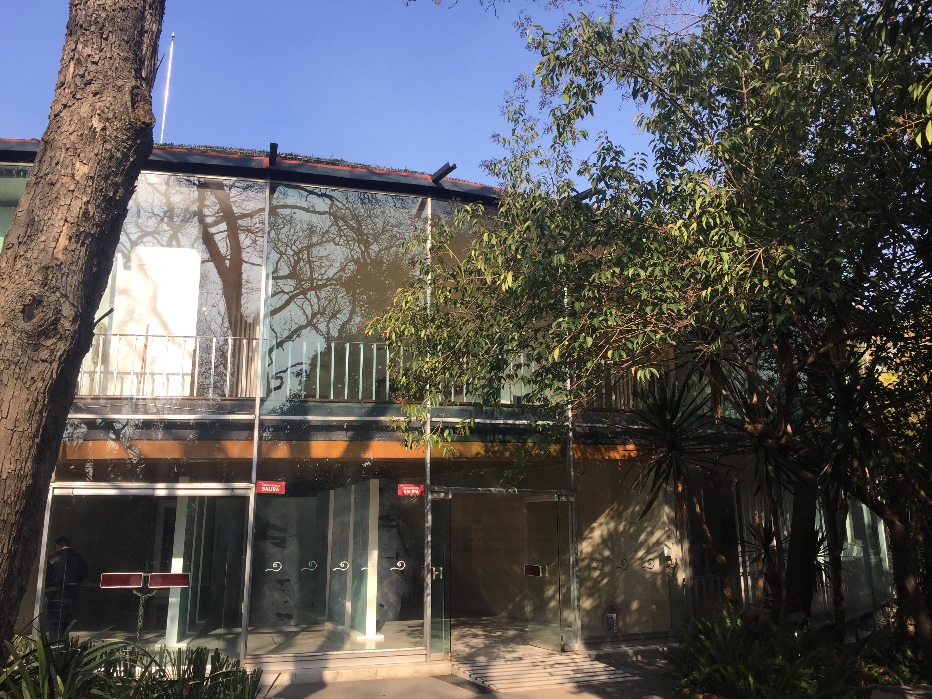 Salida del Museo